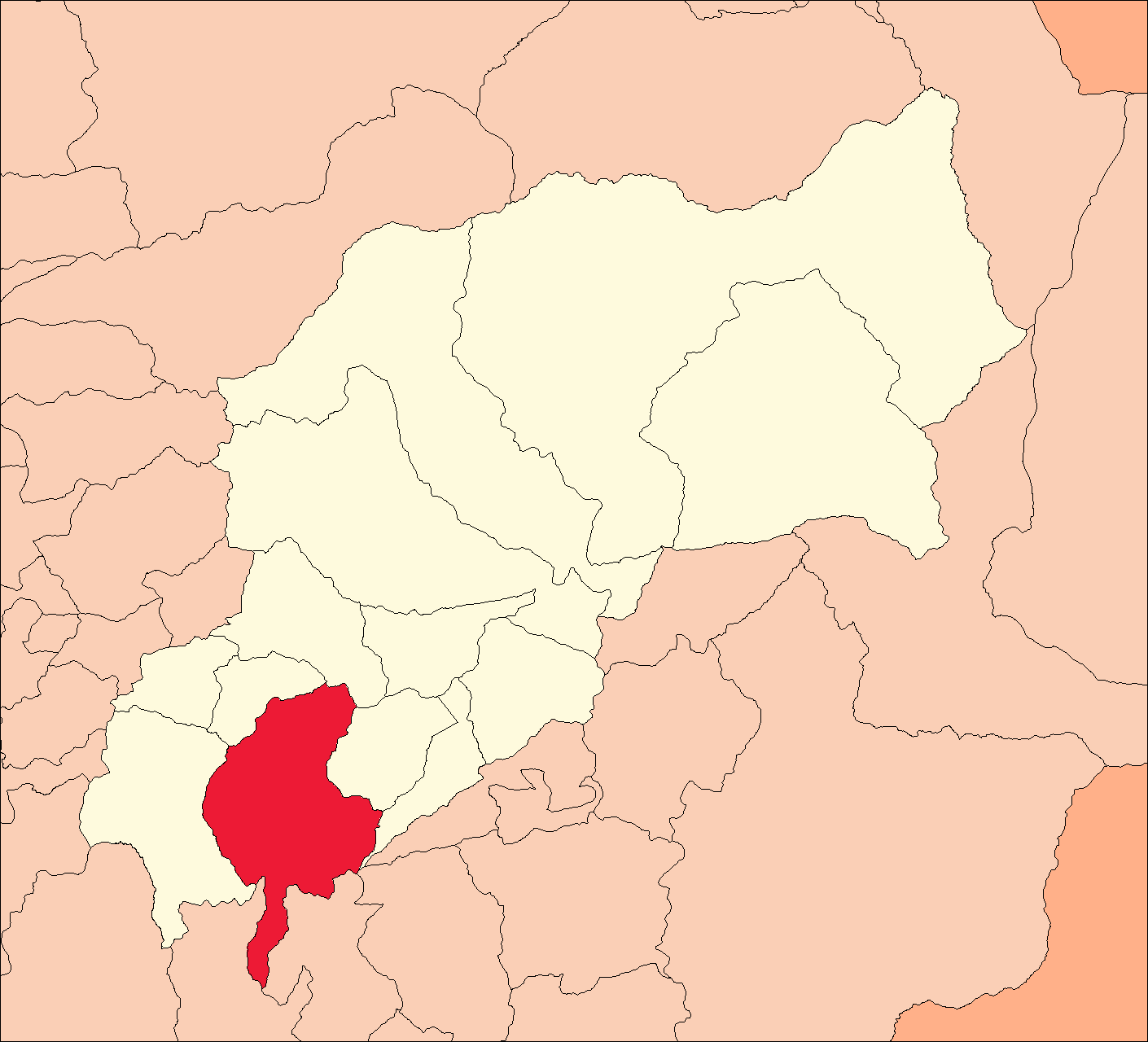 Área del distrito de San Pedro de Chaulán.